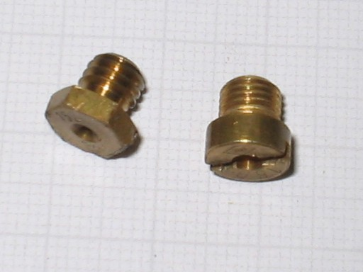 Getto per carburatori motociclistici a ghigliottina